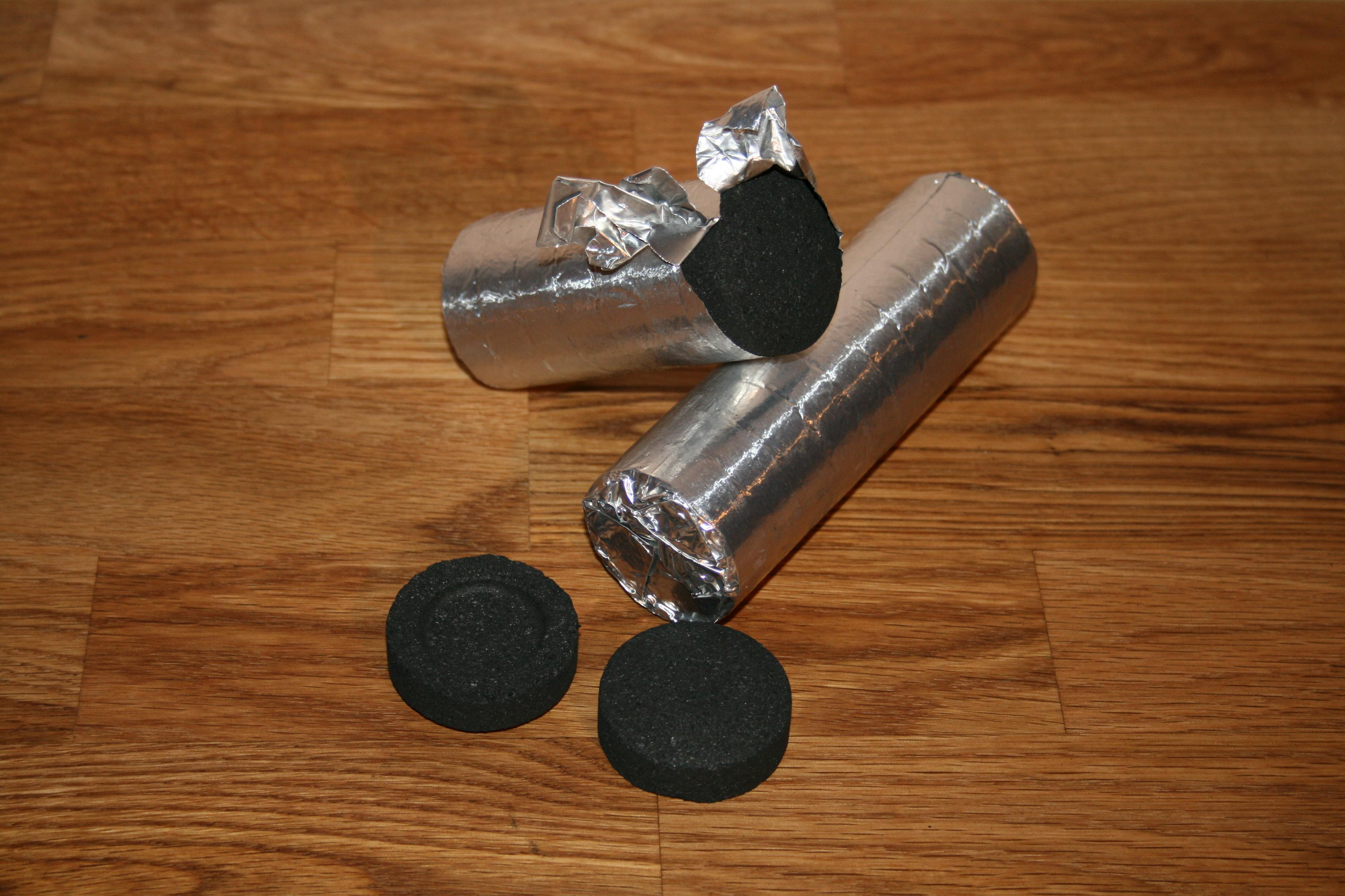 Selbstzündende Kohletabletten